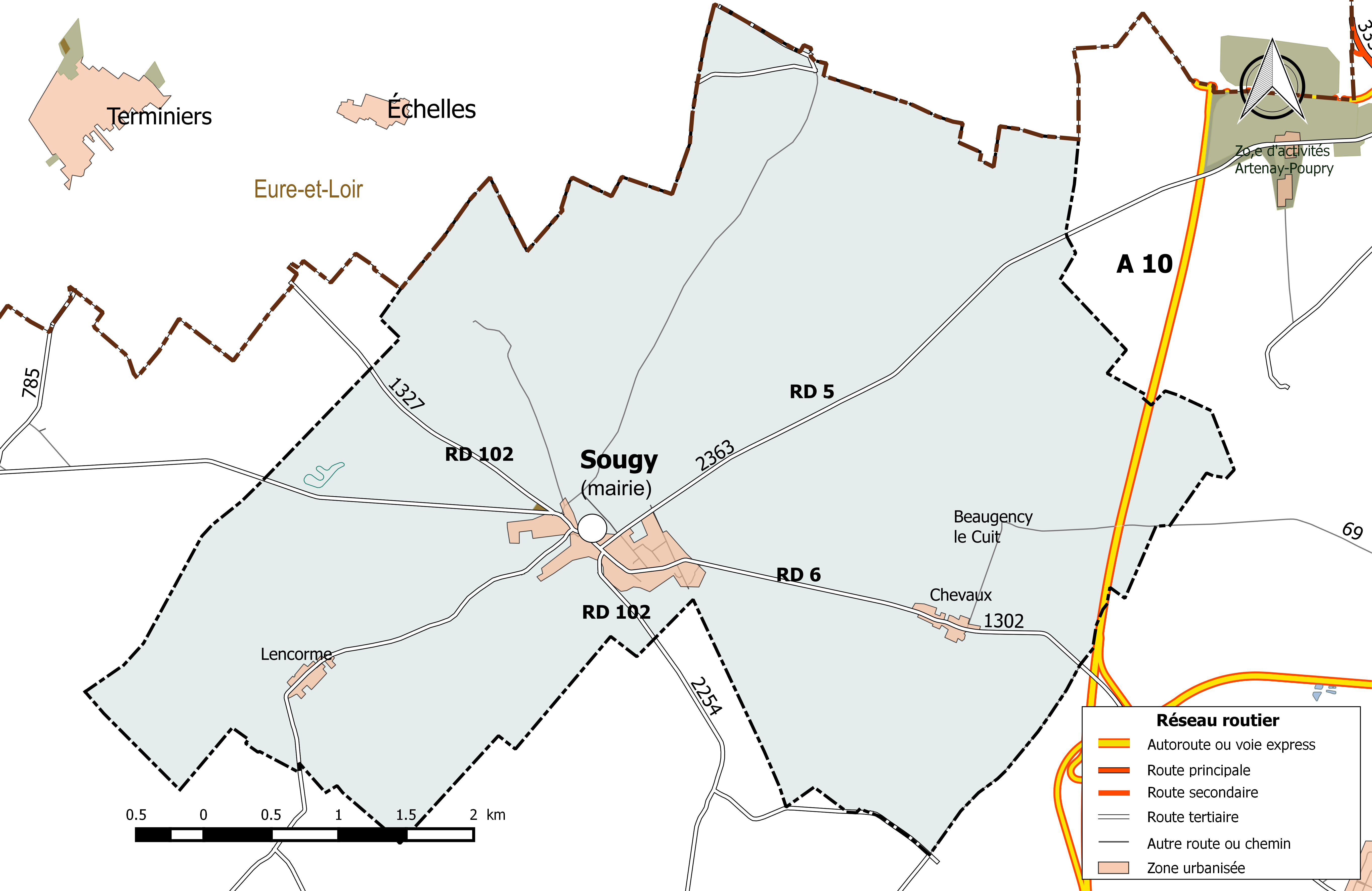 Carte du réseau routier de la commune de Sougy.